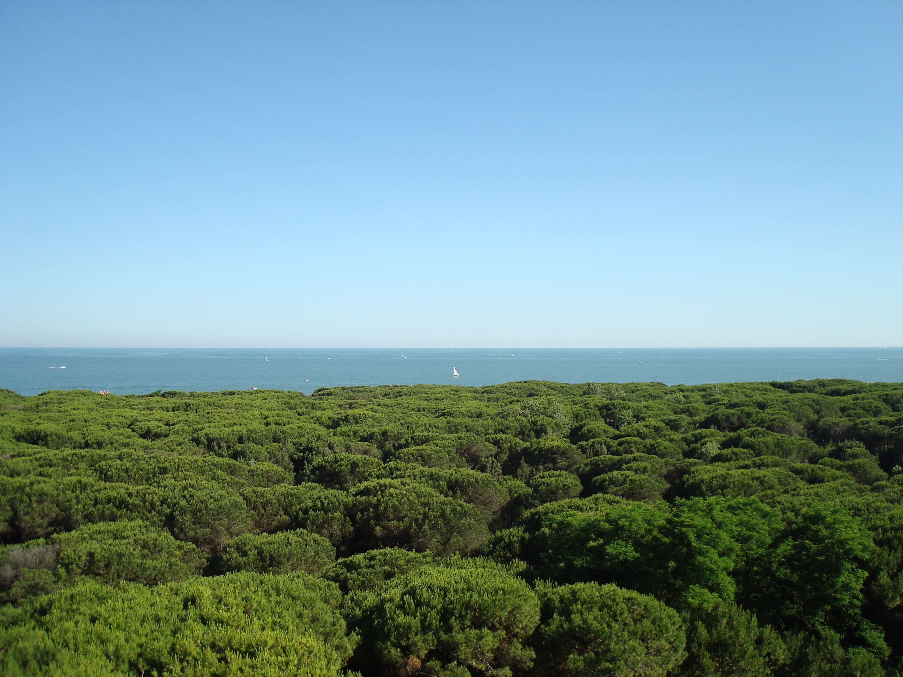 Foto della pineta di Eraclea Mare vista dal solarium del Residence Plaza.